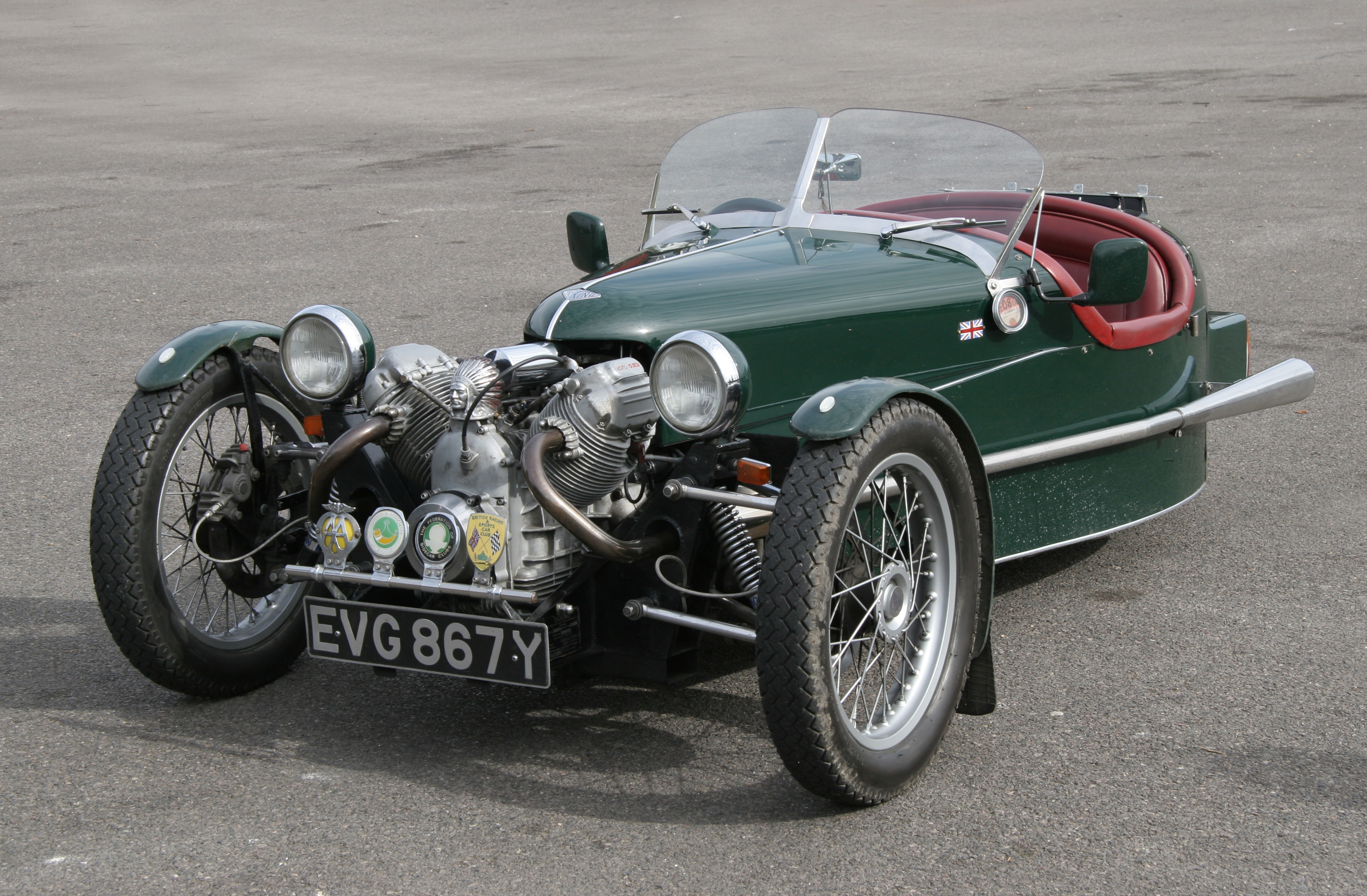 Triking Cyclecar